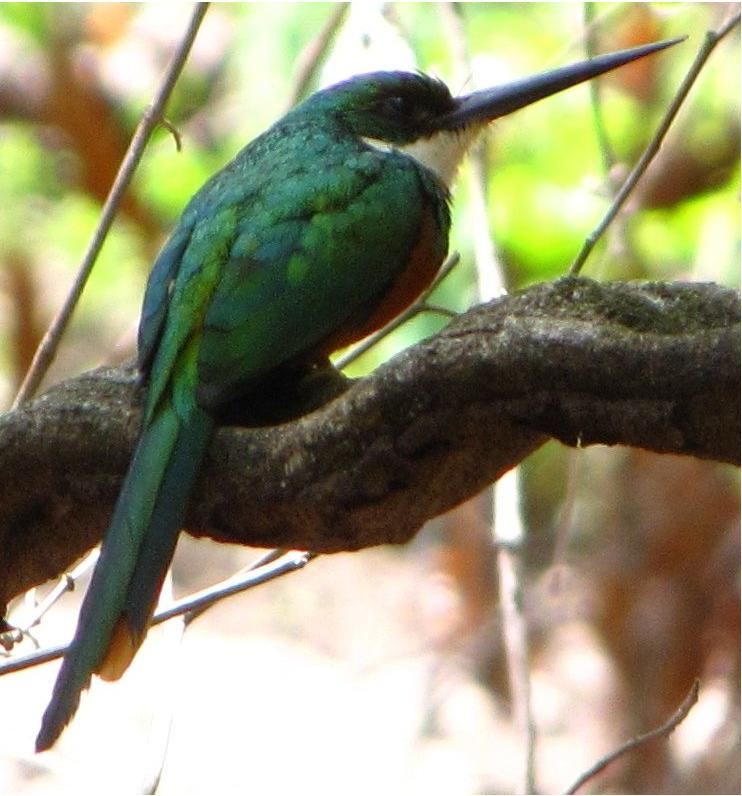 Lugar / place / lieu : Embalse de Tierra Blanca. Estado Aragua, Venezuela.